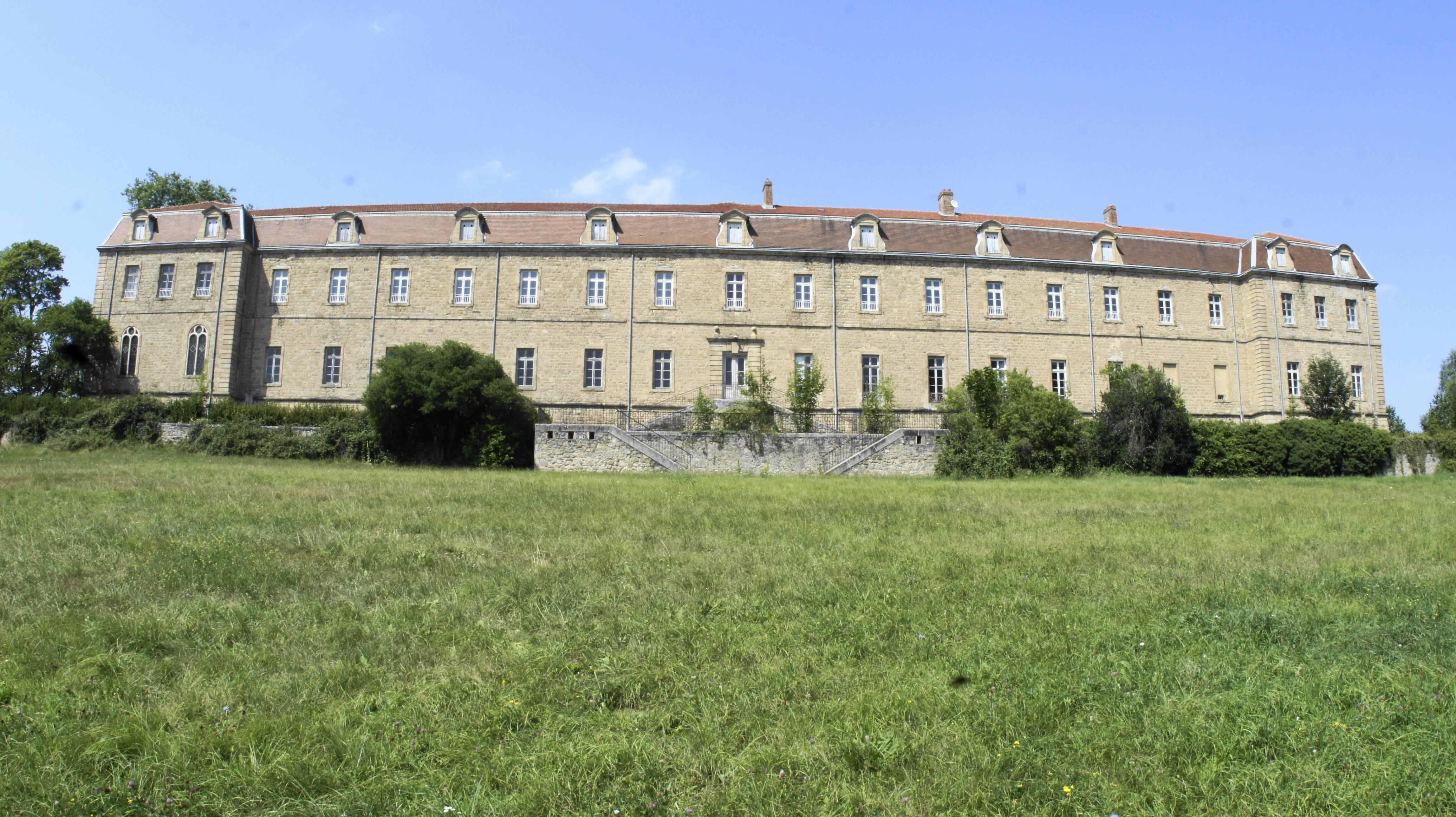 Vue de la façade du Château des Célestins avec à gauche du bâtiment, la chapelle